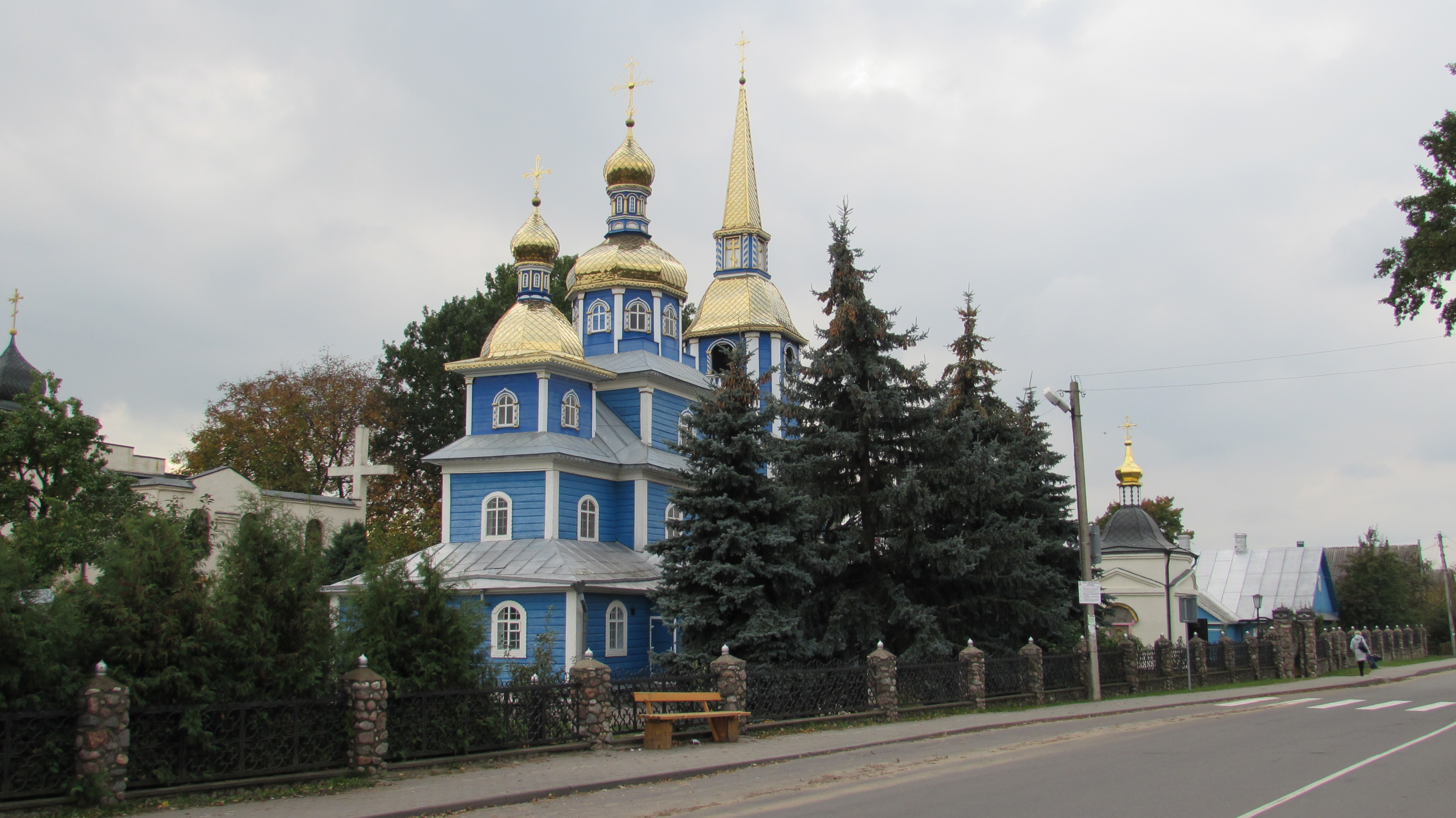 SluzkKirche